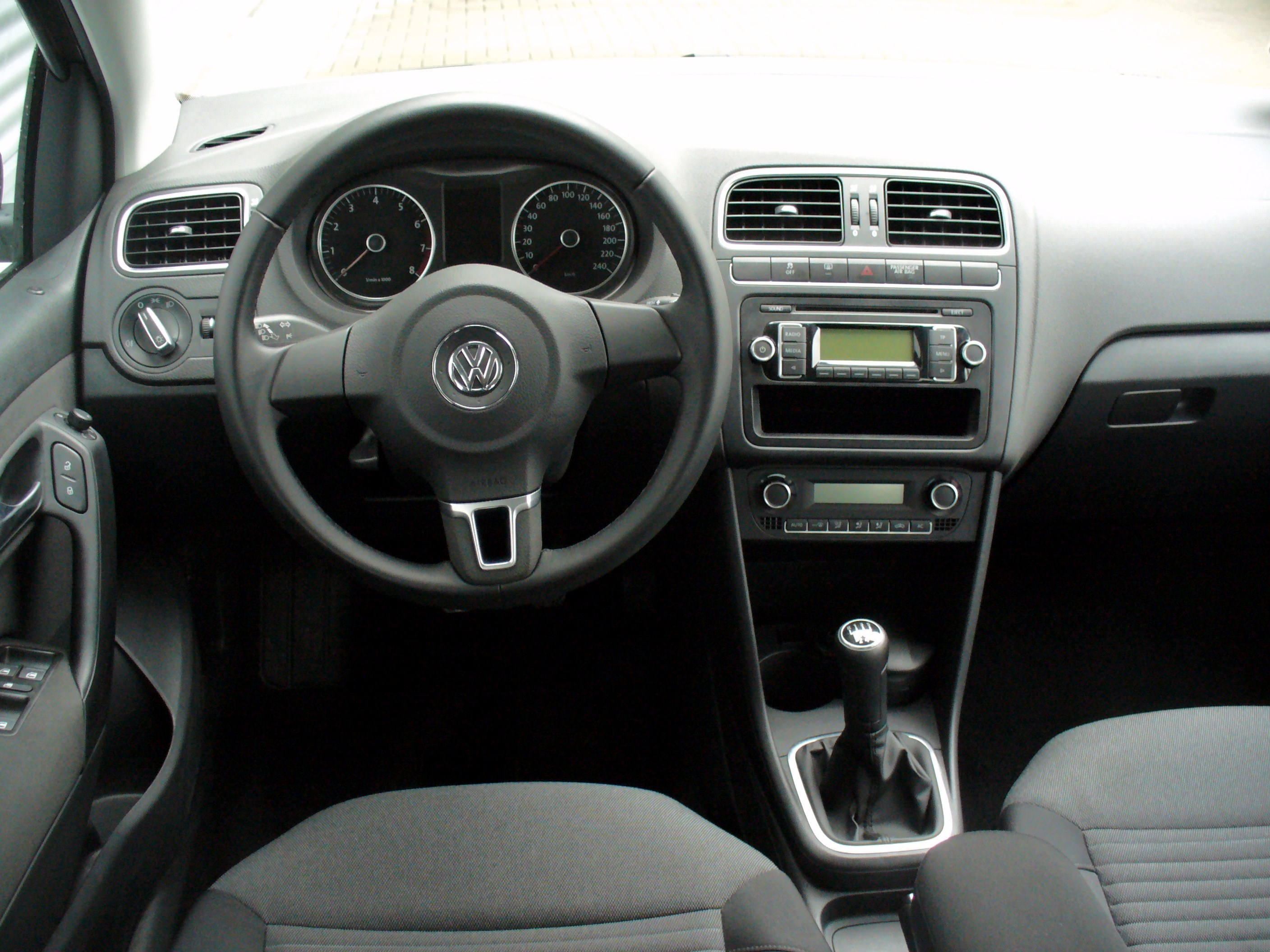 VW Polo V